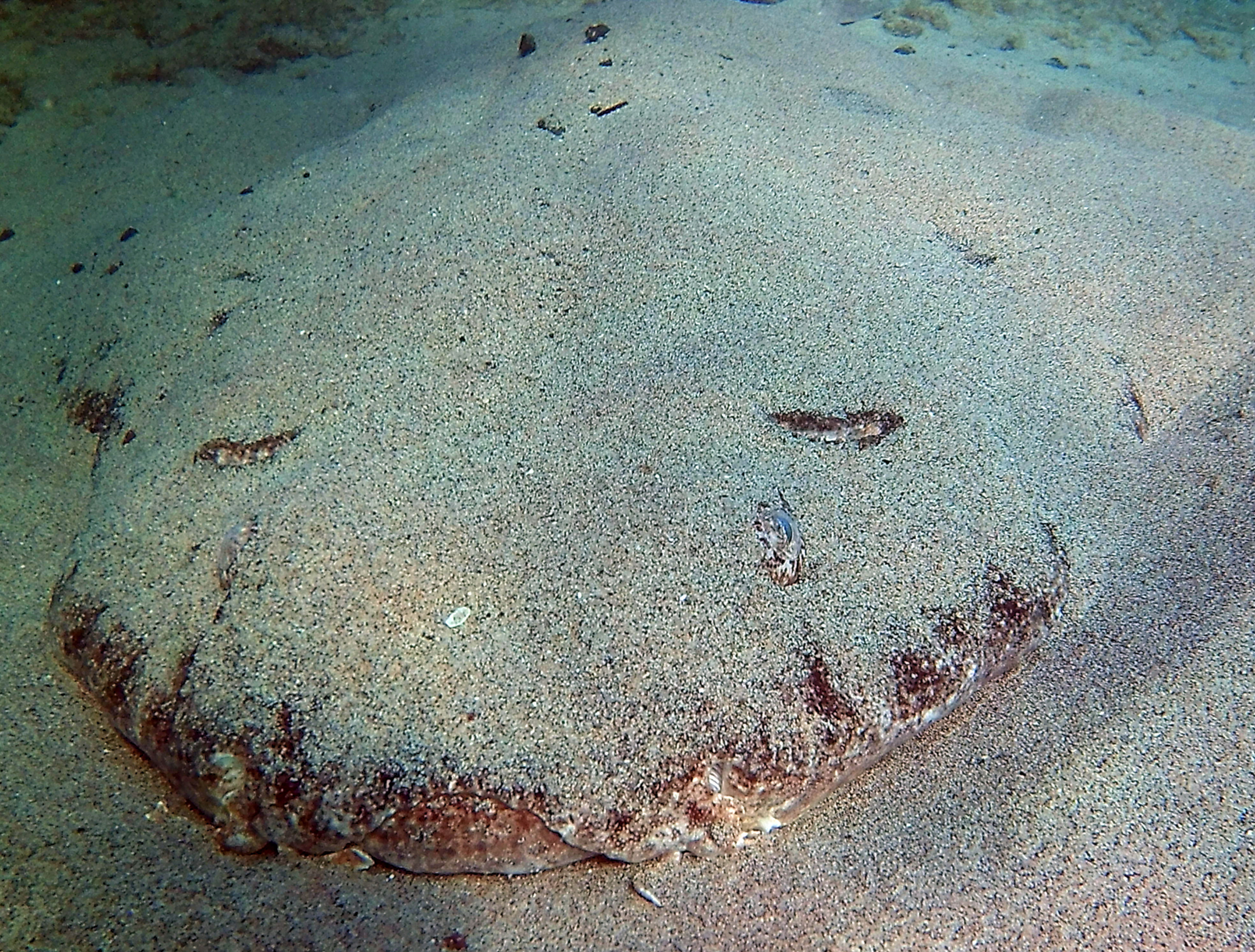 Squatina squatina vor Lanzarote, Punta de Papagayo, eingegraben im Sand